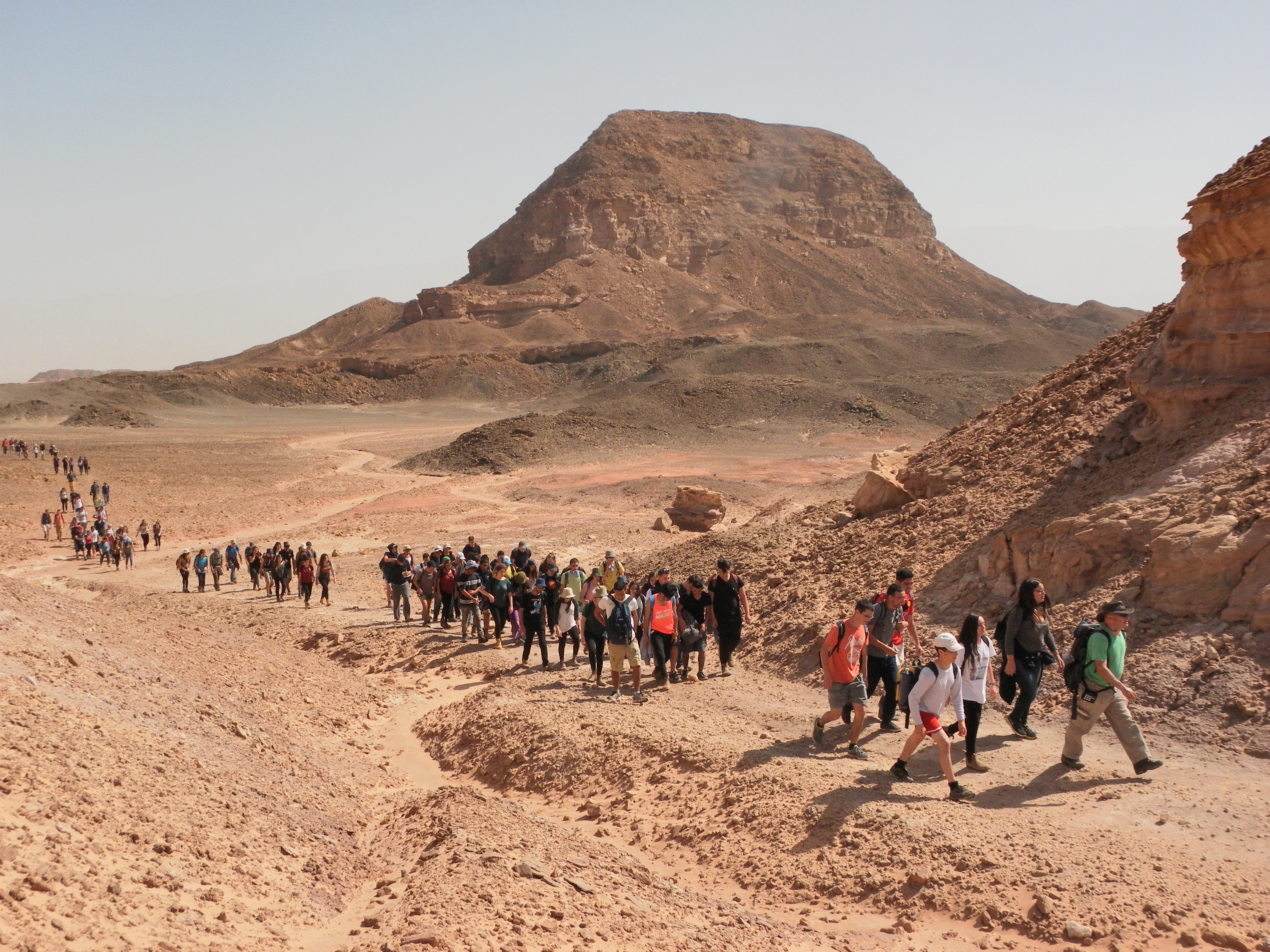 תלמידי תיכון המושבה מזיכרון יעקב בעמק ססגון, ברקע גבעת ססגון